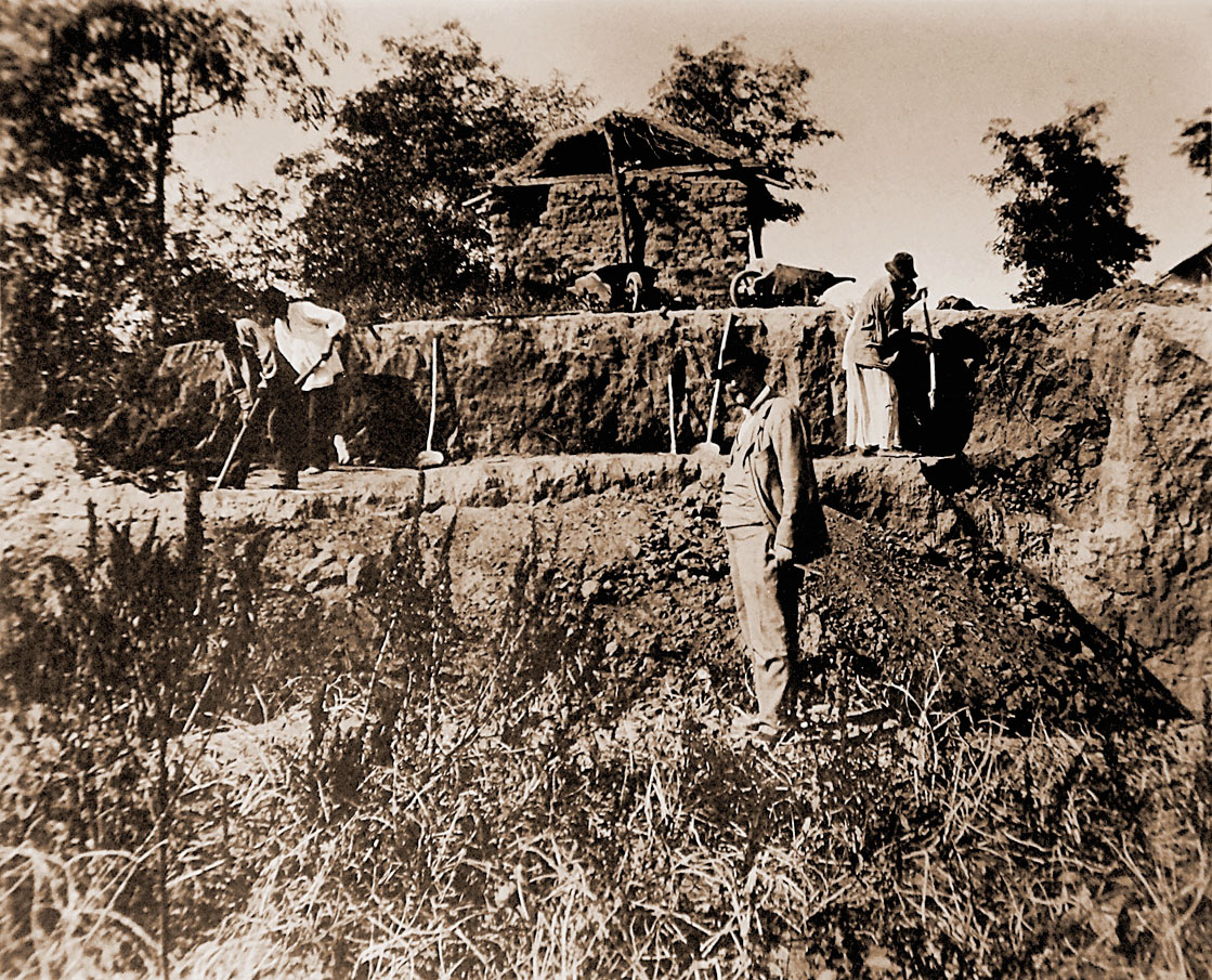 Prva arheološka istraživanja Feliksa Milekera na lokalitetu u Vatinu 1893.